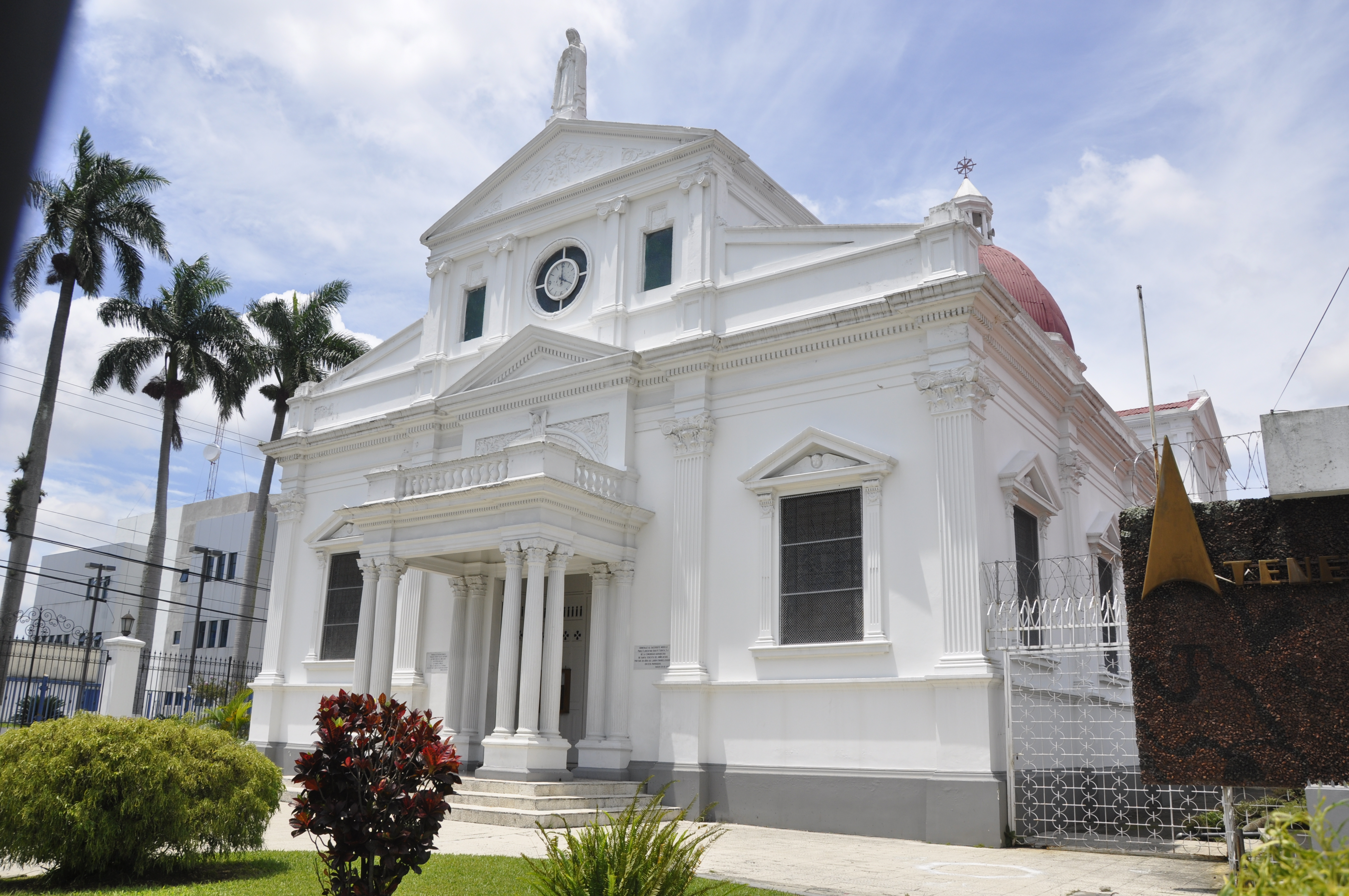 Iglesia de Santa Teresita del Niño Jesús, Barrio Aranjuez, San José, Costa Rica